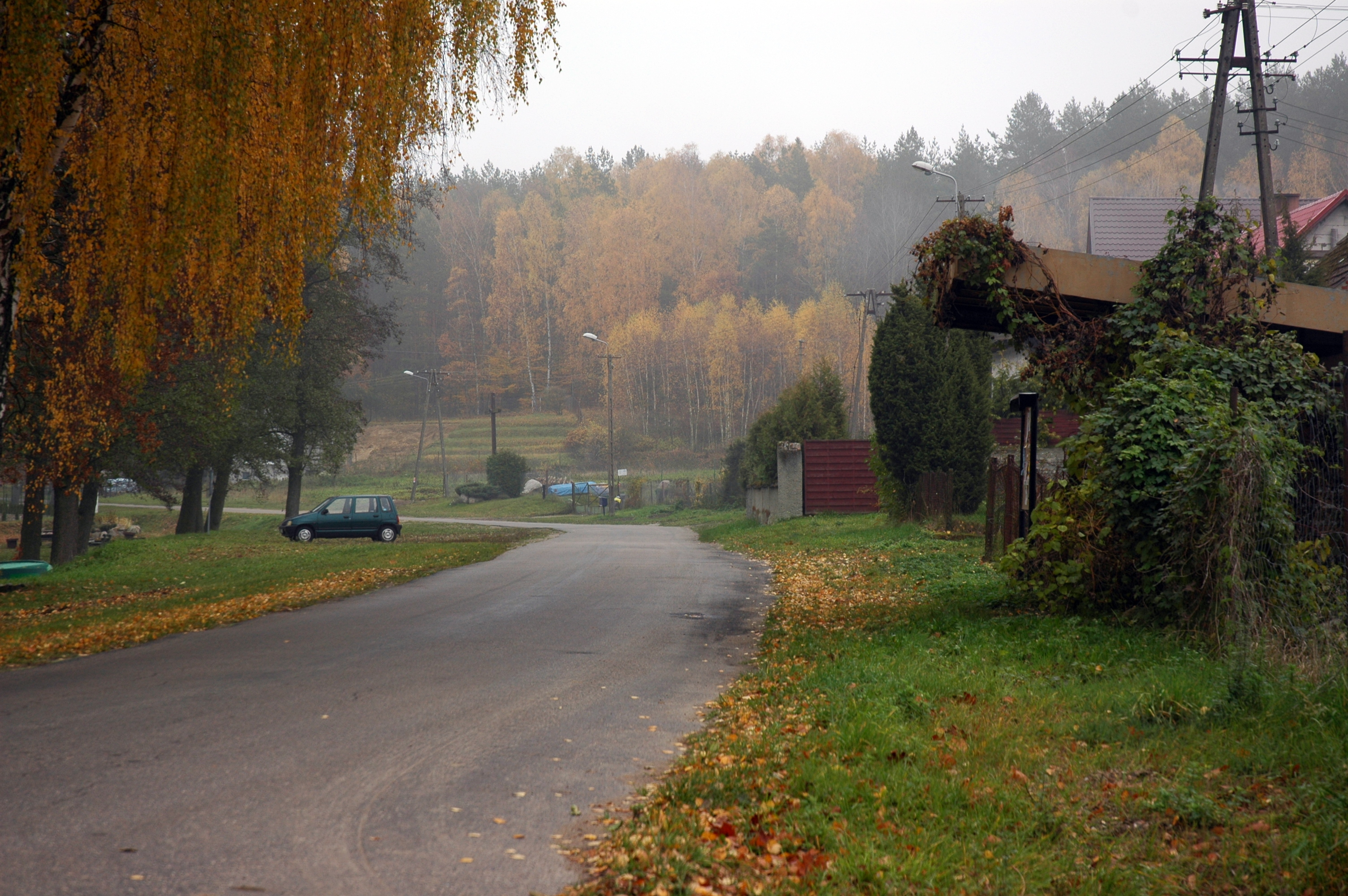 Ciemino